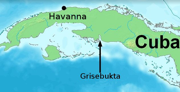 Grisebukta på Cuba.